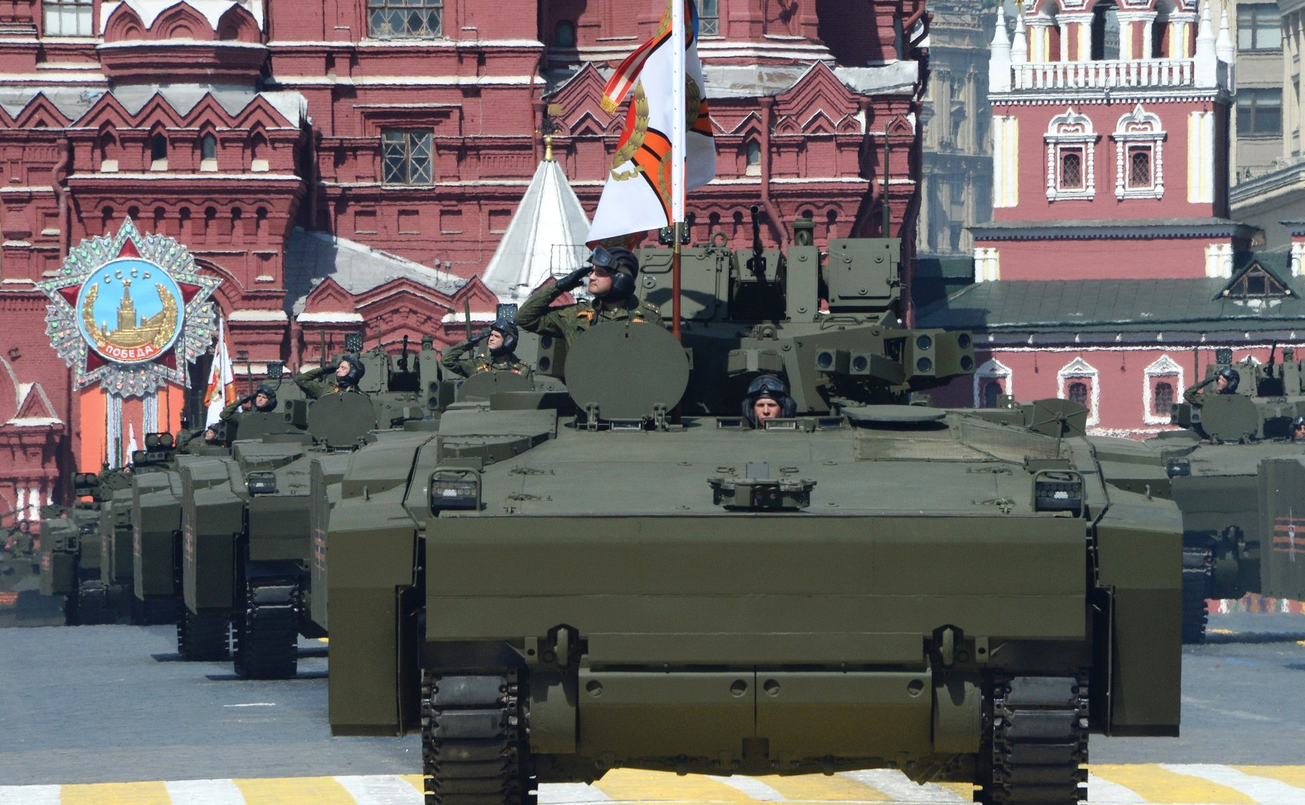 Бронетранспортер (БТР) на гусеничной платформе Курганец-25 во время военного парада в ознаменование 70-летия Победы в Великой Отечественной войне 1941–1945 годов.